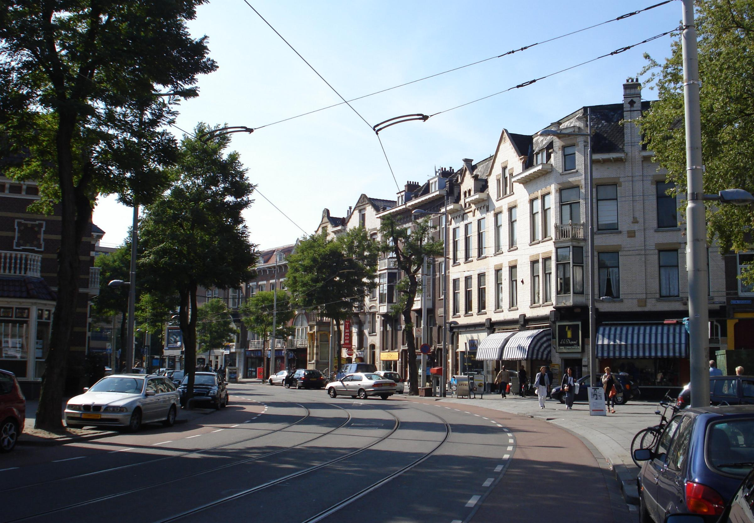 Nieuwe Binnenweg, straat in Rotterdam.